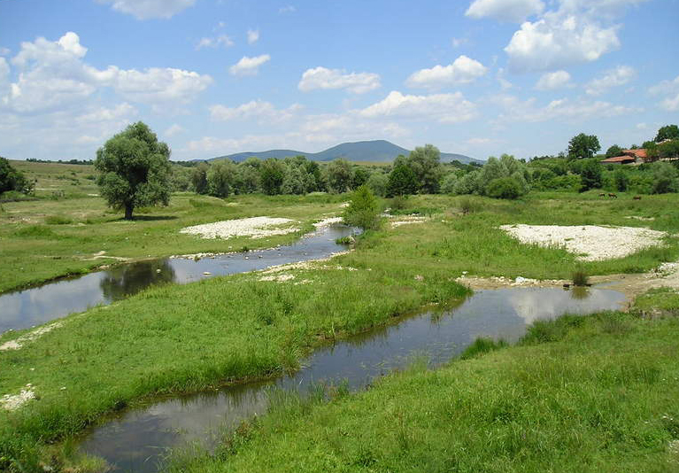 Манастирските възвишения край Тополовград